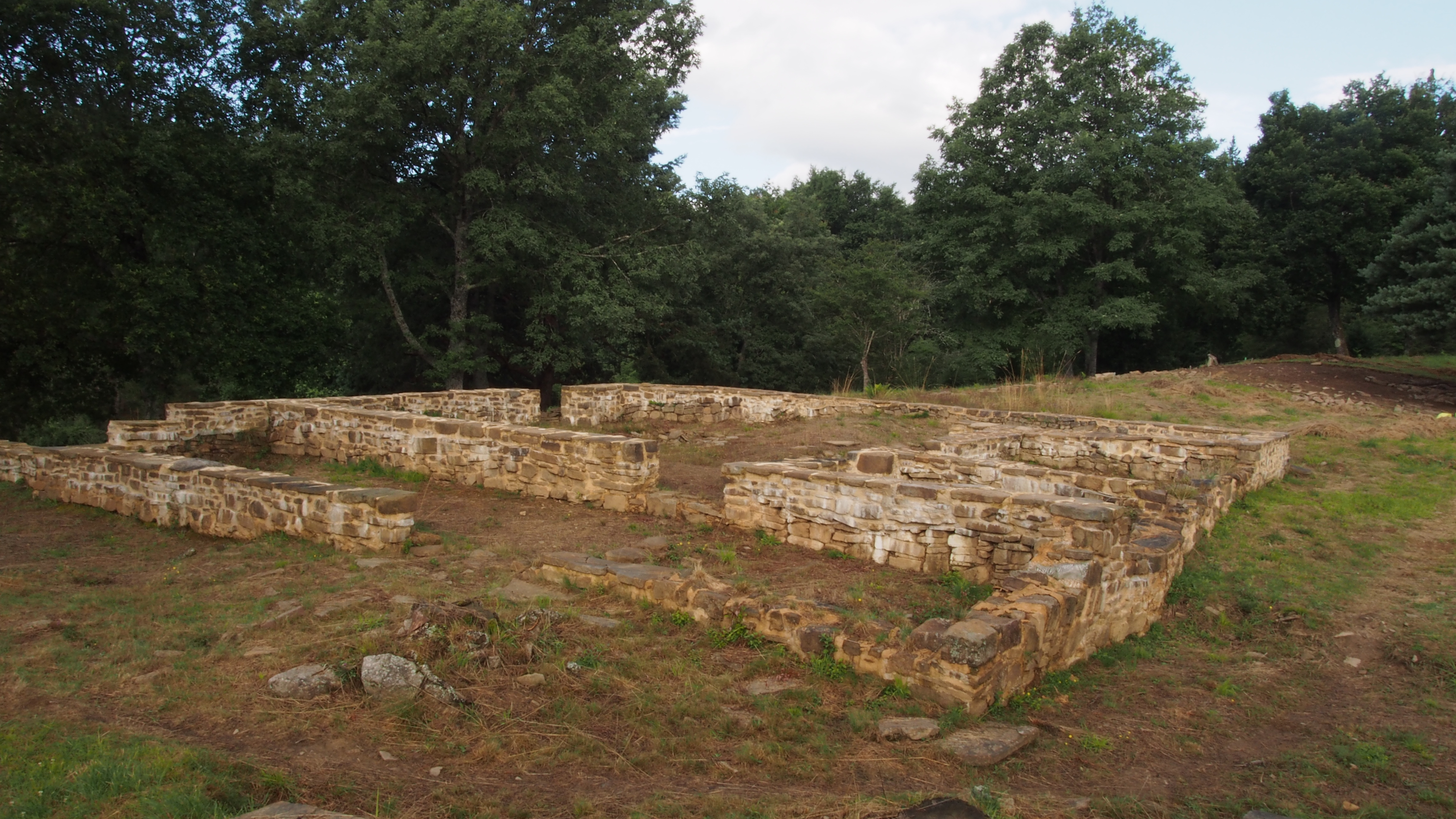 Elexazar. Hego-ekialdeko eraikuntza konplexua. Hormako errenkada batzuk berreraiki dira.